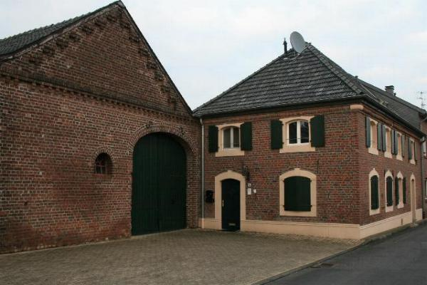 Hofanlage in Wegberg-Uevekoven